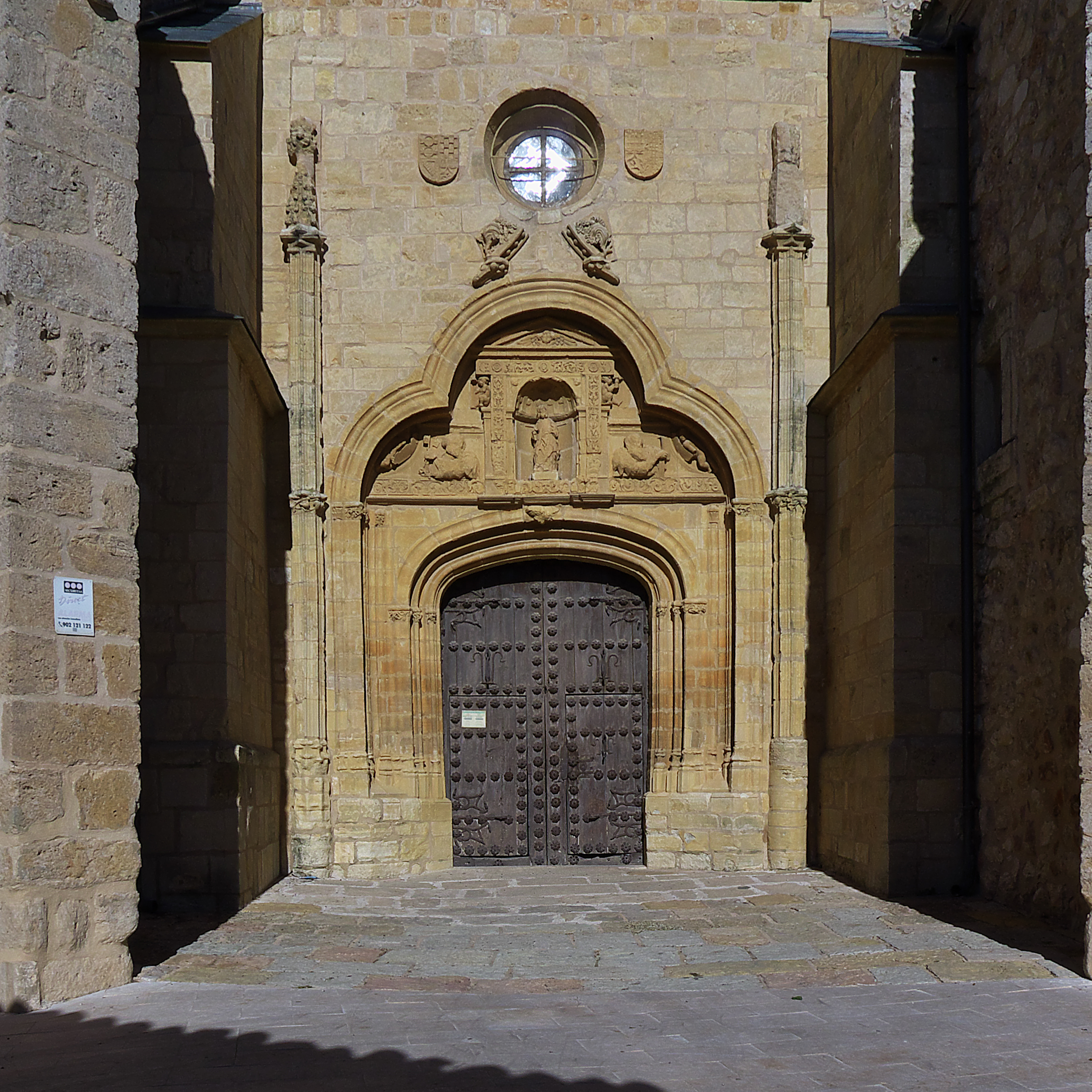 Portada meridional de la iglesia, con los escudos del Marquesado de Villena. A principios del siglo XVI se le añadió un tímpano plateresco.